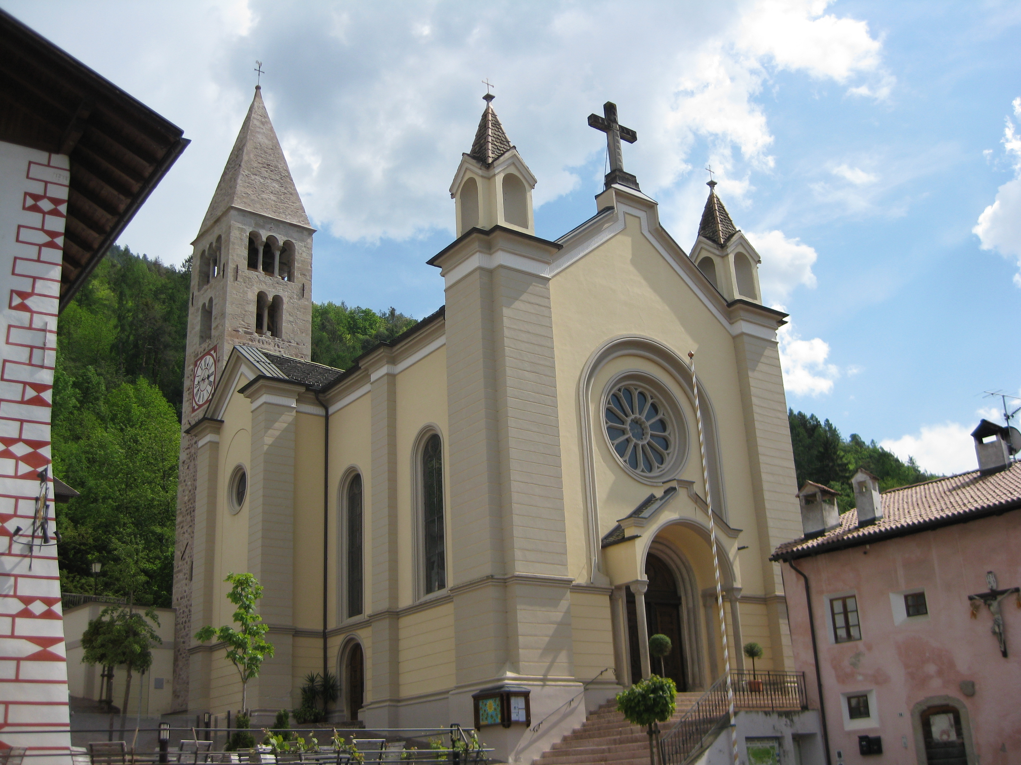 Pfarrkirche St. Bartholomäus in Montan